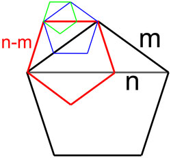 Incommensurabilité de la section d'or par les pentagones emboités